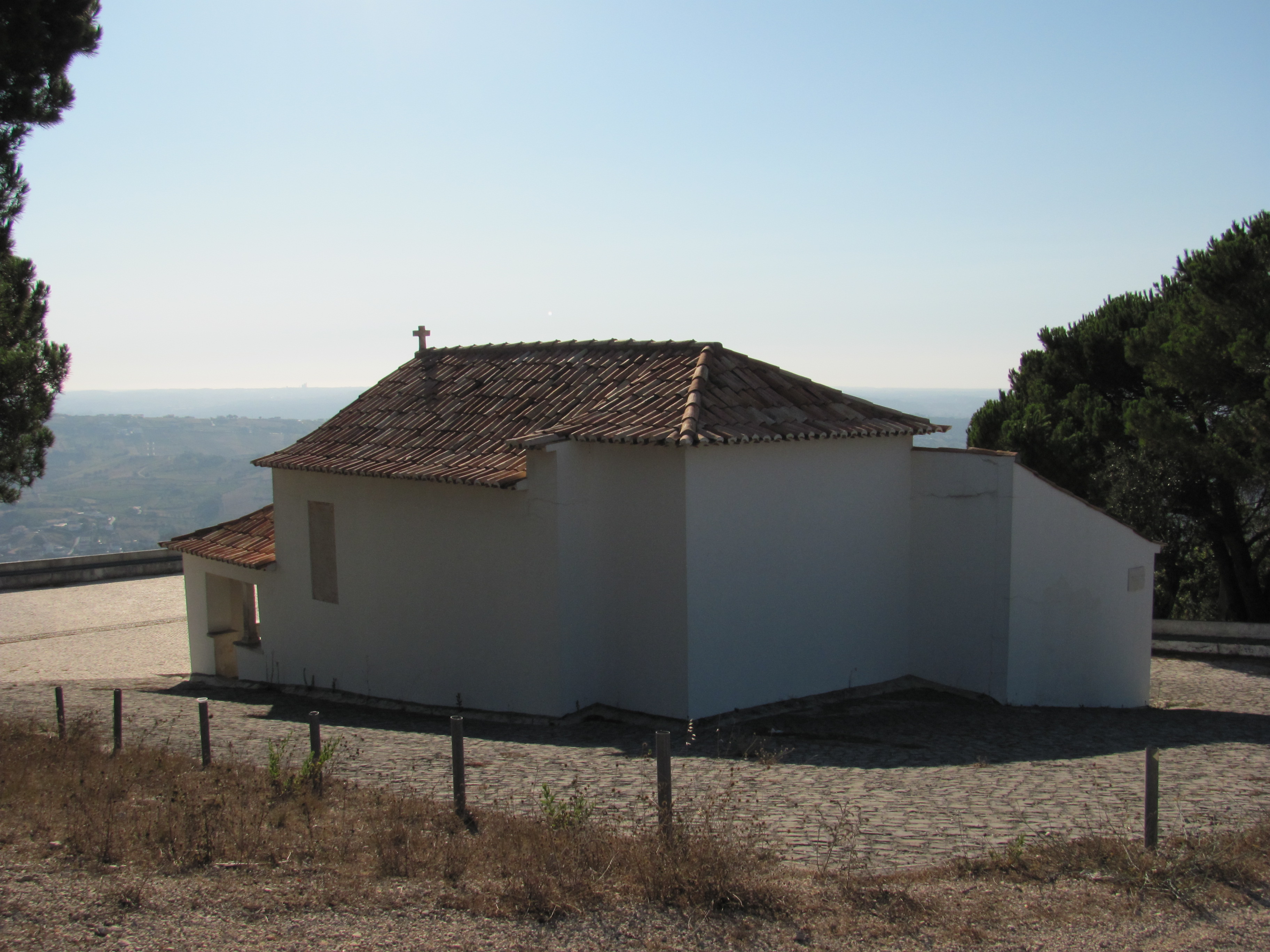 Photographie de la chapelle de la Dame du Mont (capela da Senhora do Monte), Cortes, Leiria, Portugal. Vue arrière, prise depuis la route.